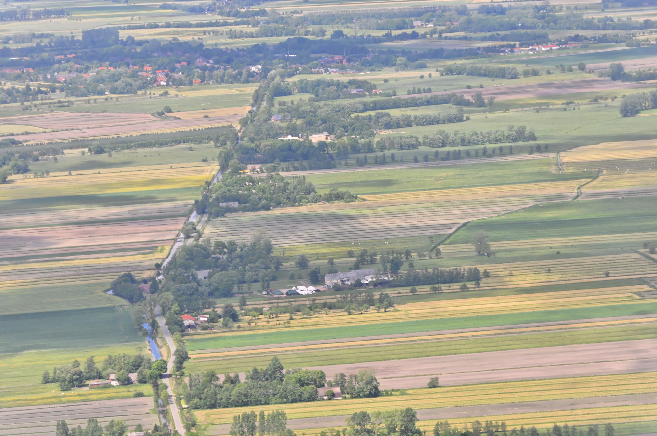 Überführungsflug vom Flugplatz Schwarzheide-Schipkau über Potsdam, Lüneburg zum Flugplatz Nordholz-Spieka